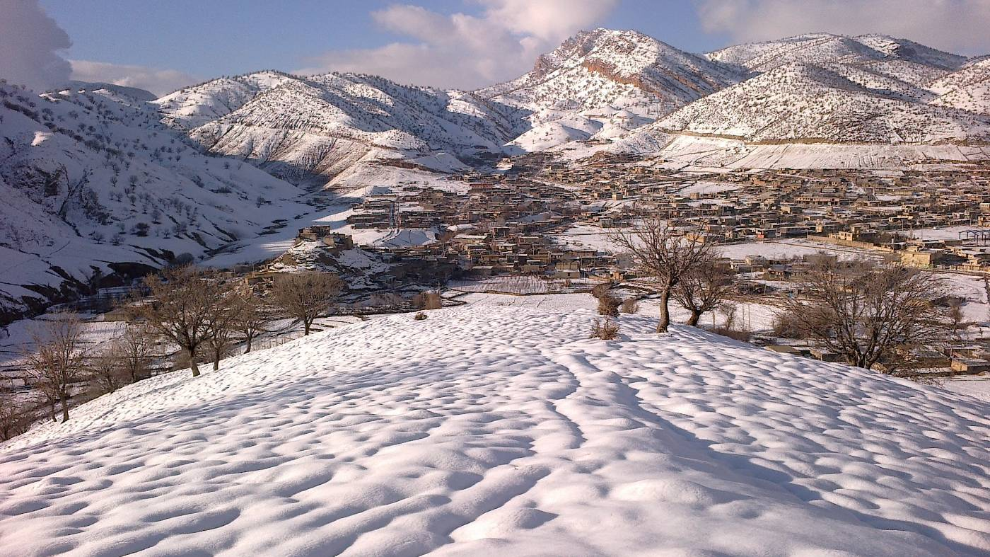 برف دیشموک